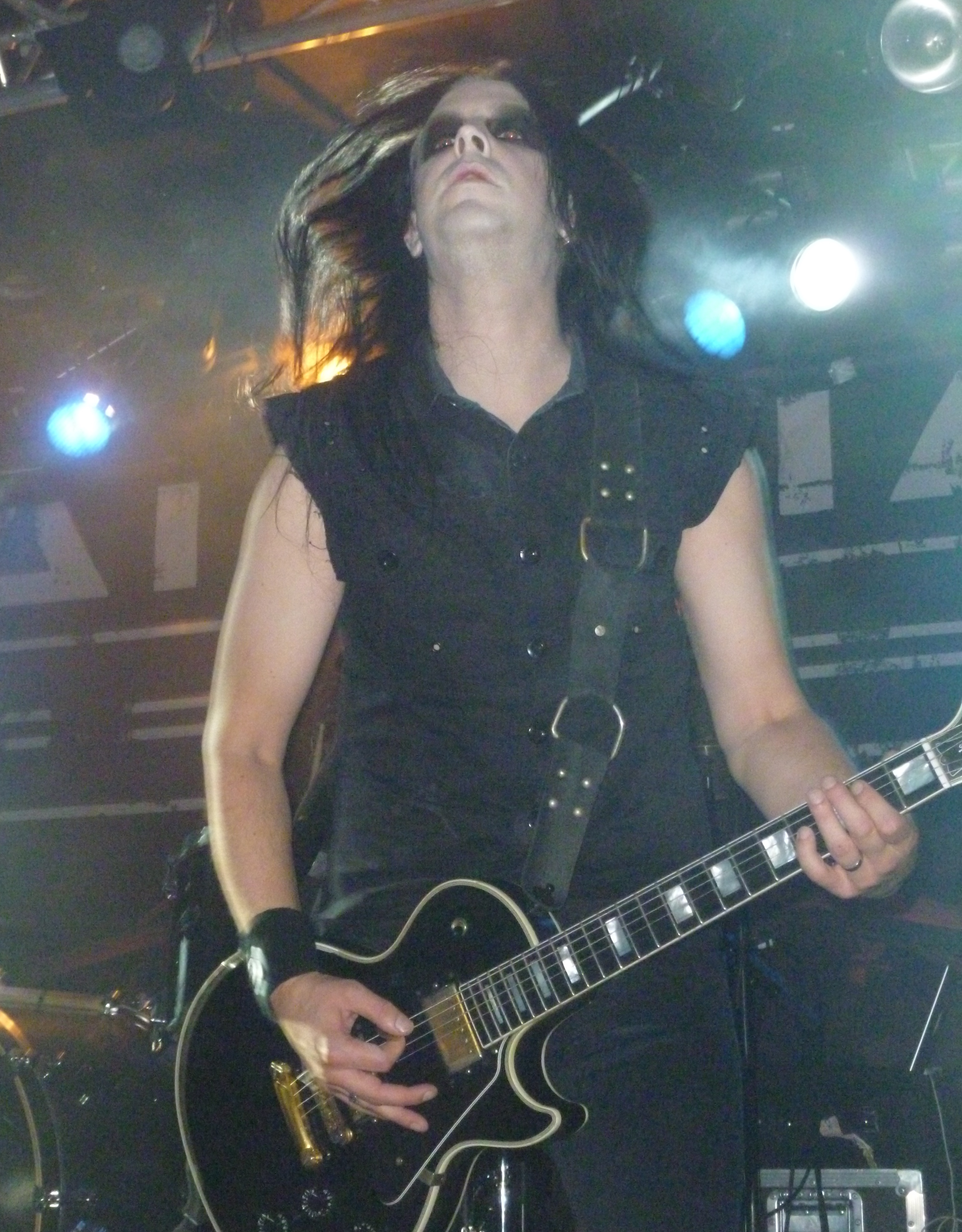 Emil Nödtveidt alias Nightmare Industries Debaser Strand Stockholm 04-10-2014